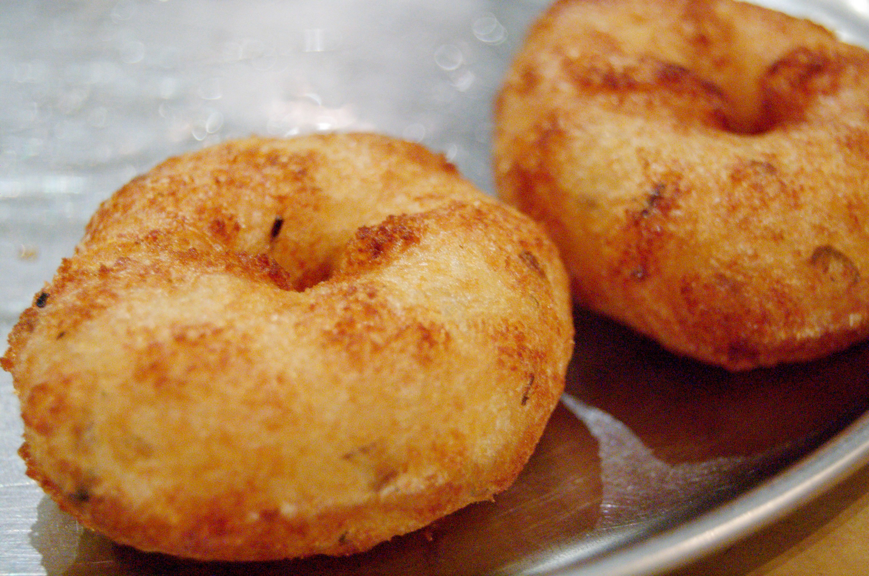 vadas!